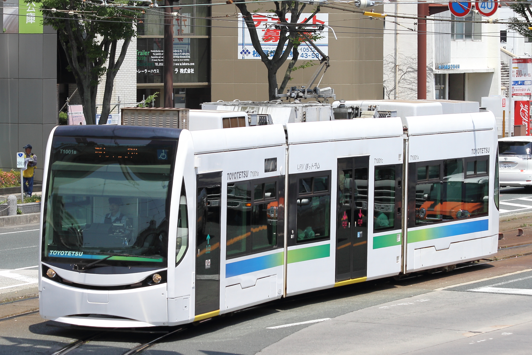 豊橋鉄道T1000形 (T1001)